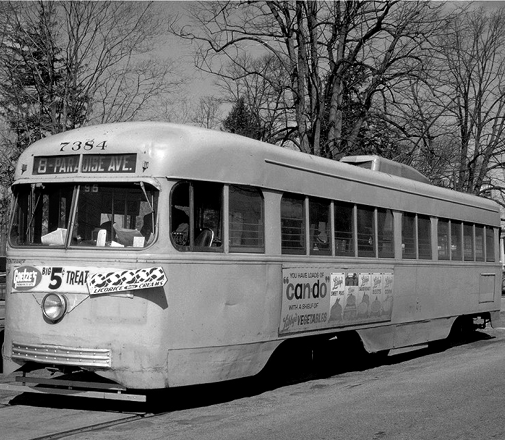 PCC van Baltimore. Een door mijn vader gemaakte ZW foto eind jaren 50 in Baltimore. Licensing Categorie:Afbeelding tram